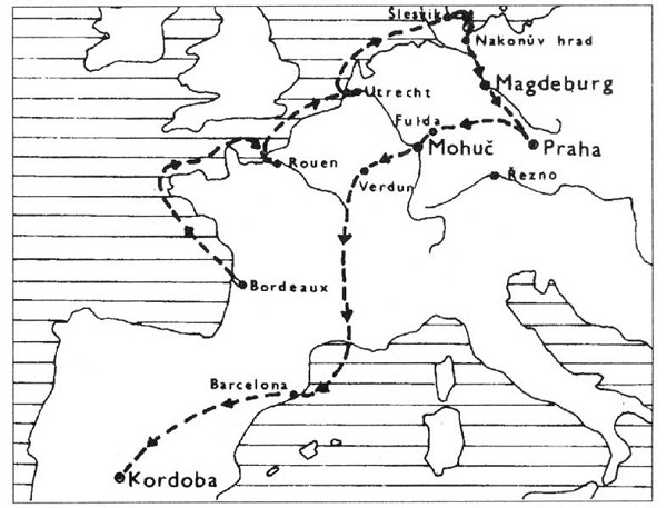 Trasa Ibrahima ibn Jakuba